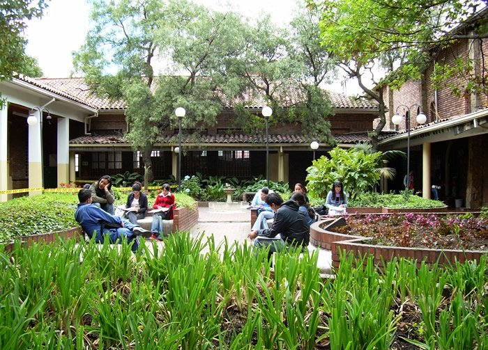 Campus Central Park